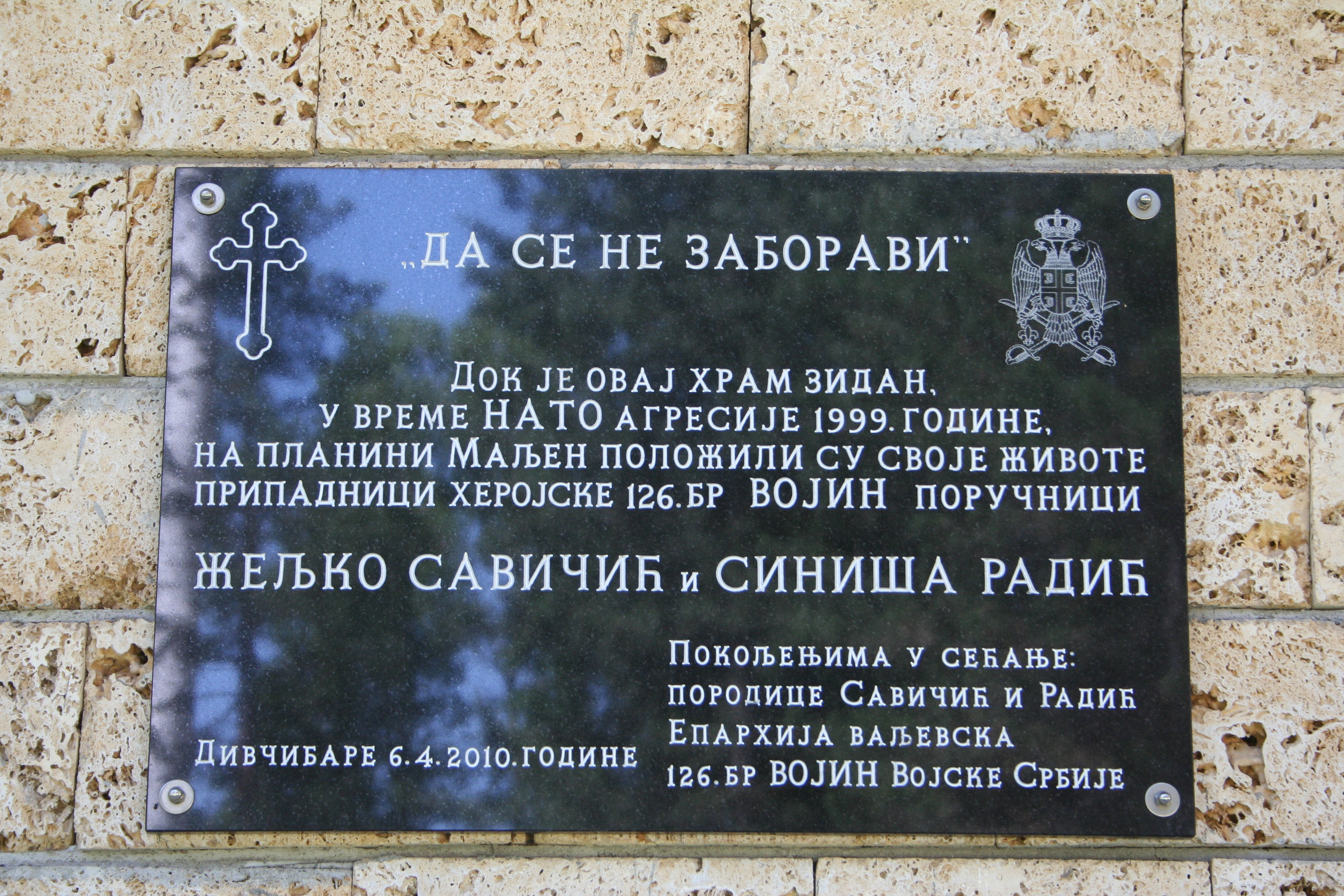 Crkva Sv. Pantelejmona, Divčibare